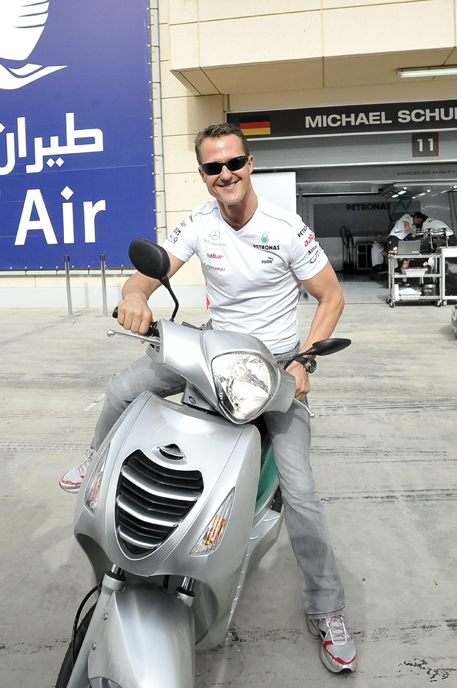 Micheal Schumacher di Bahrain 2012